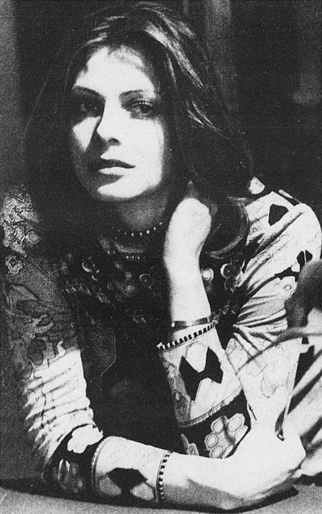 Rome (Italy), circa 1972. Italian actress Rita Calderoni.